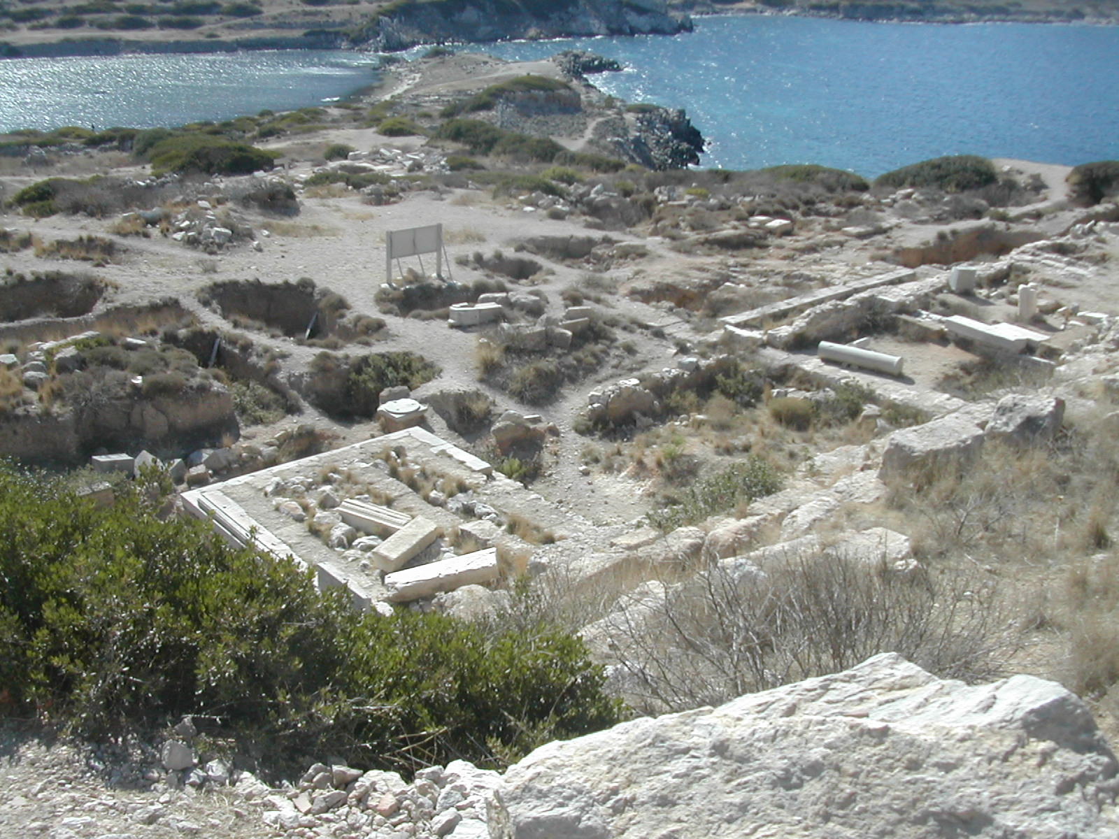 Soubassement et modestes vestiges de ce qui fut autrefois une cité très prospère.